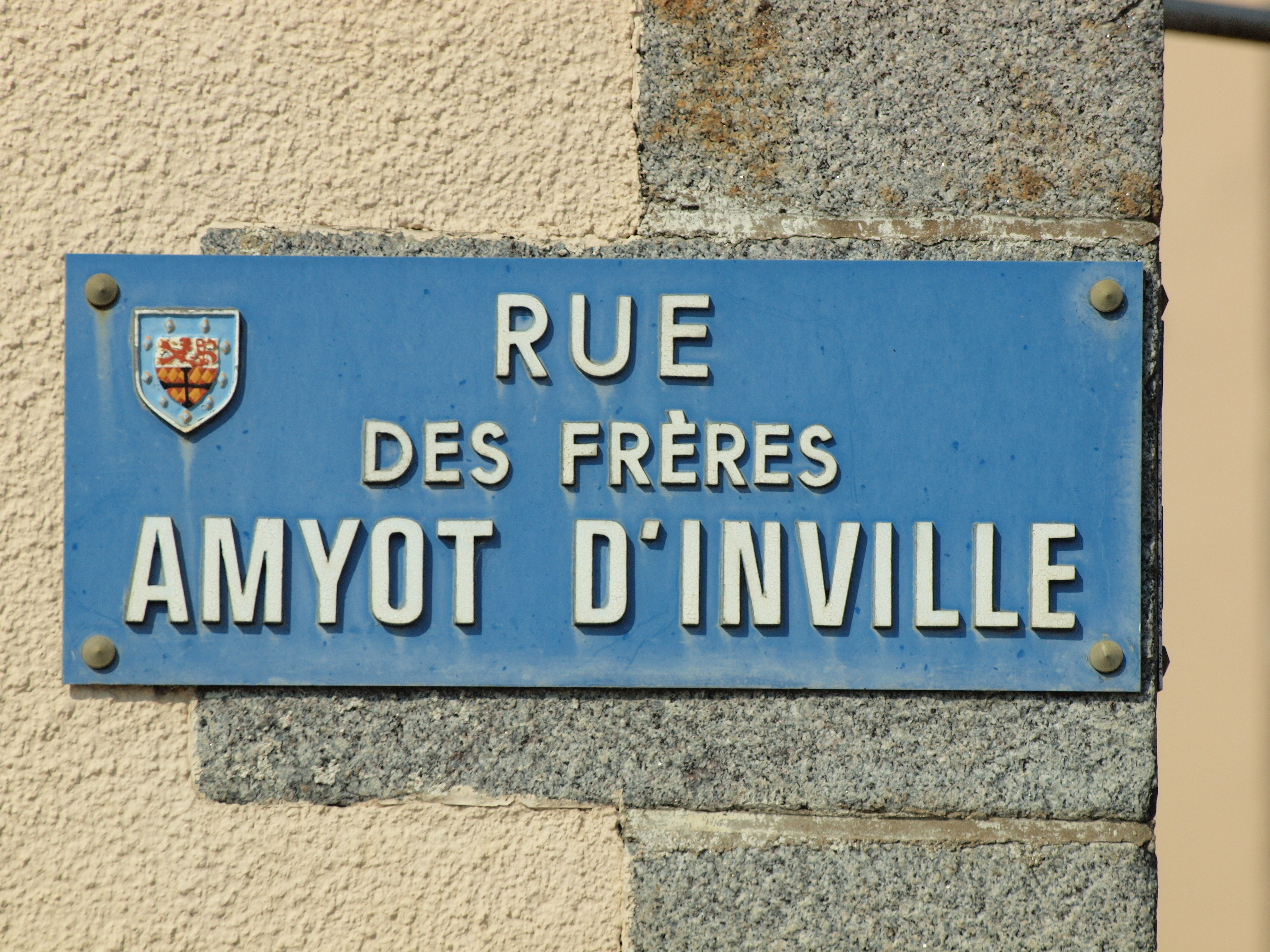 Louvigné-de-Bais (Ille-et-Vilaine, France)